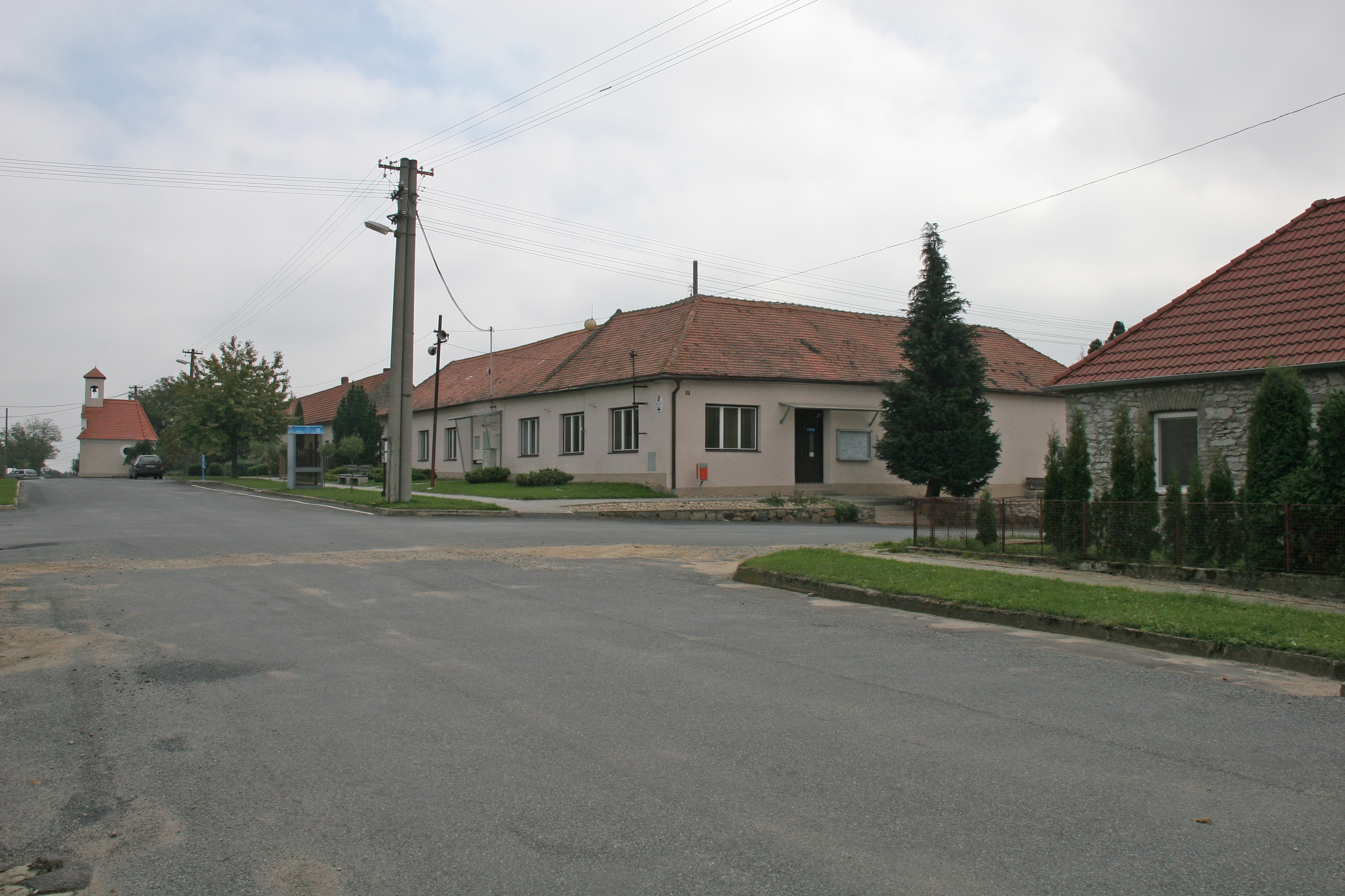 Prokopov obecní úřad